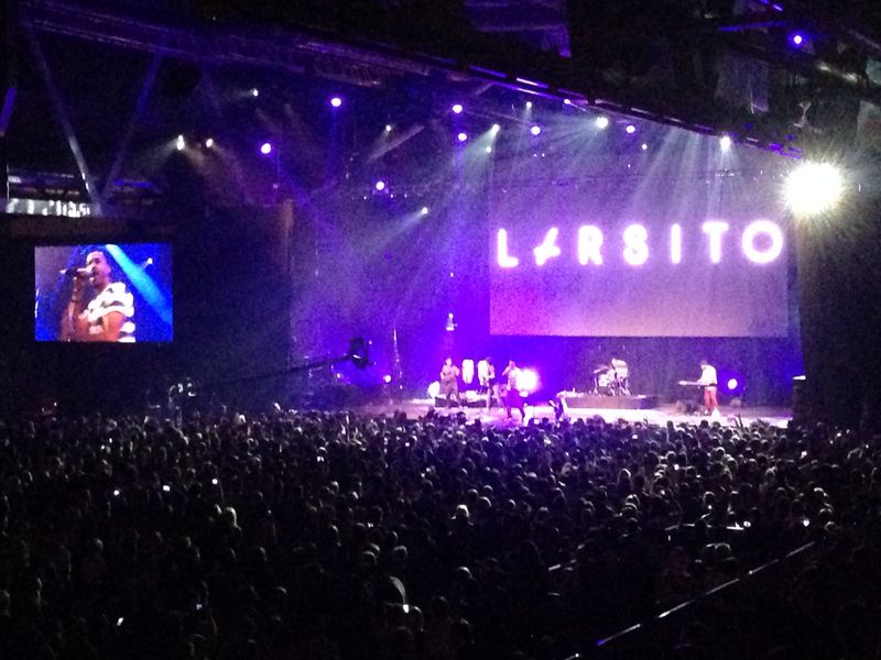 Blick auf die Bühne von Larsito